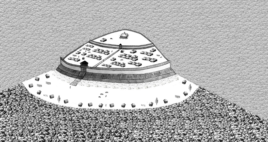 Rekonstruktionsversuch